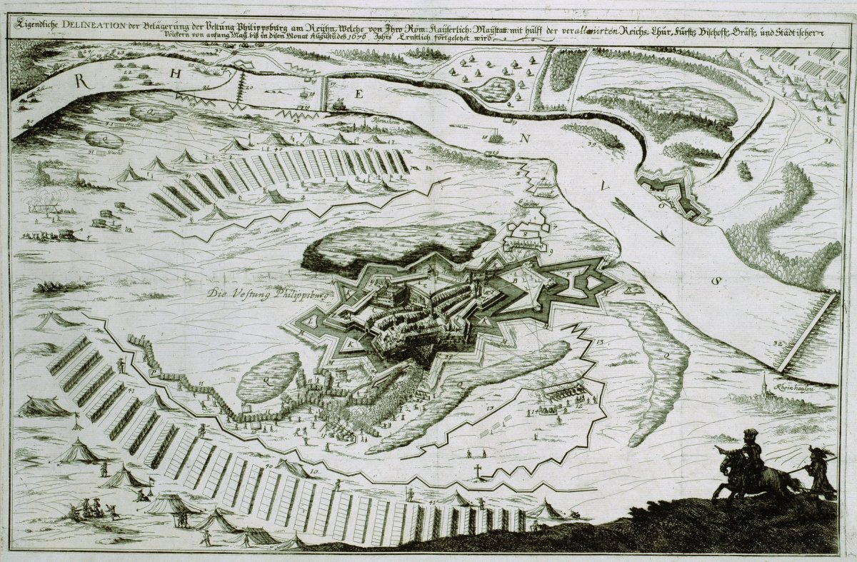 Kupferstich über die Belagerung der Festung Philippsburg 1676